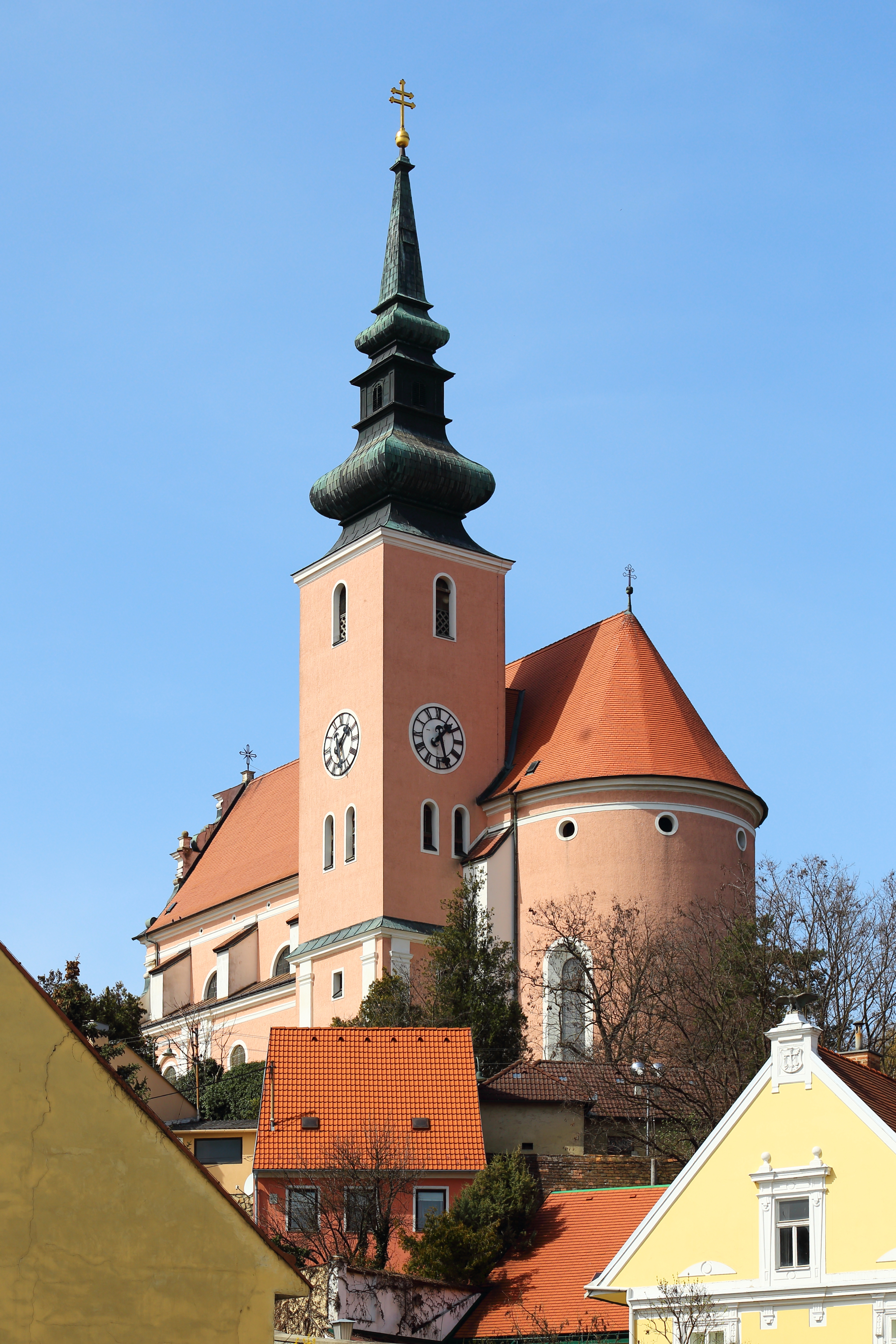 Südostansicht der römisch-katholischen Pfarrkirche hl. Johannes der Täufer in der niederösterreichischen Stadt Poysdorf.Die in erhöhter Lage im Norden des Ortes errichtete Kirche ist ein frühbarocker Bau. Er wurde von 1629 bis 1635 errichtet, im Jahr 1640 geweiht und ist von Resten einer wehrhaften Kirchenmauer umgeben. Der Turm wurde 1864 neu erbaut.